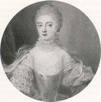 Augusta Elisabetta di Württemberg (1734-1787), principessa di Thurn und Taxis